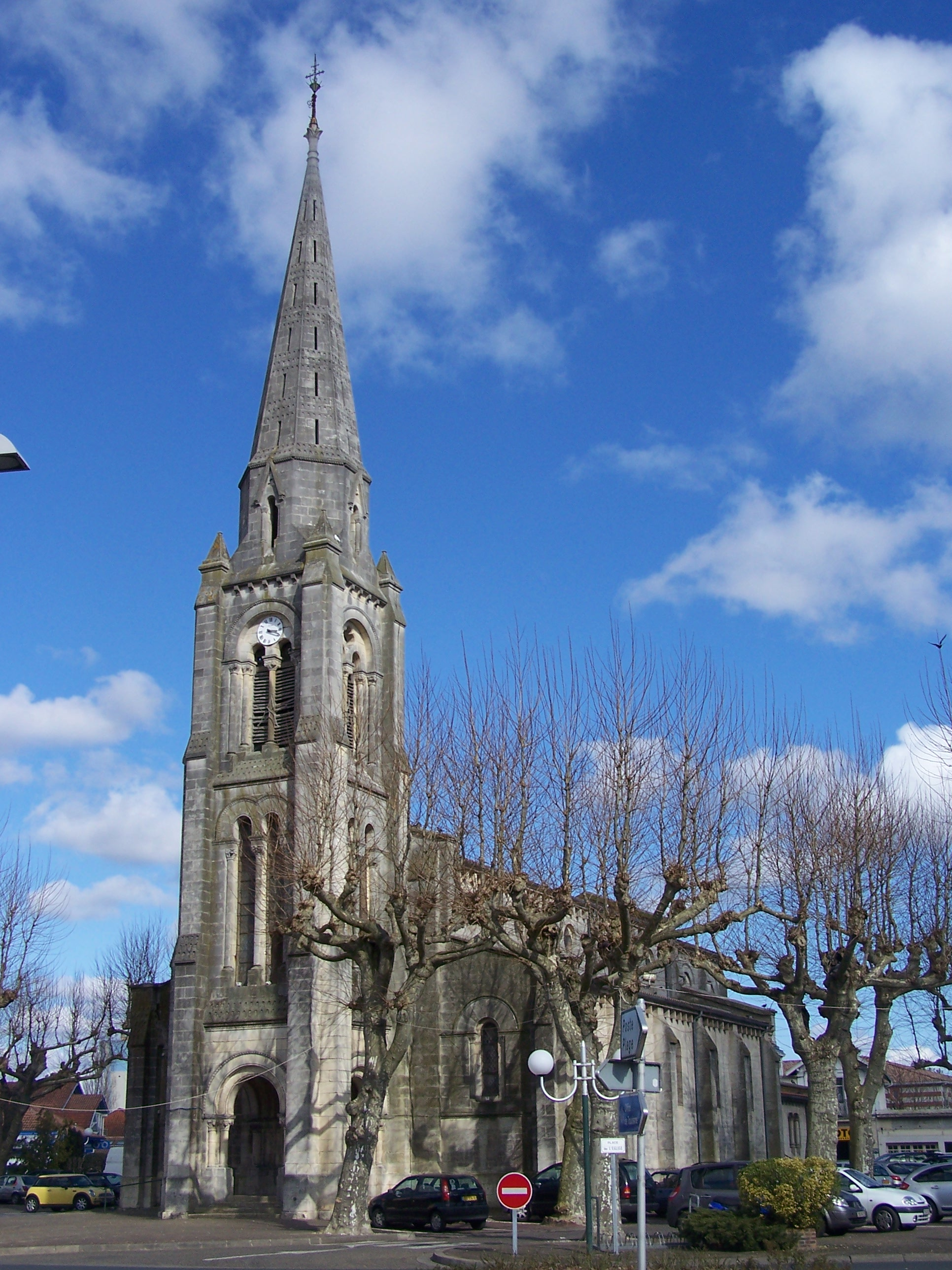 Église d'Arès, Gironde, France